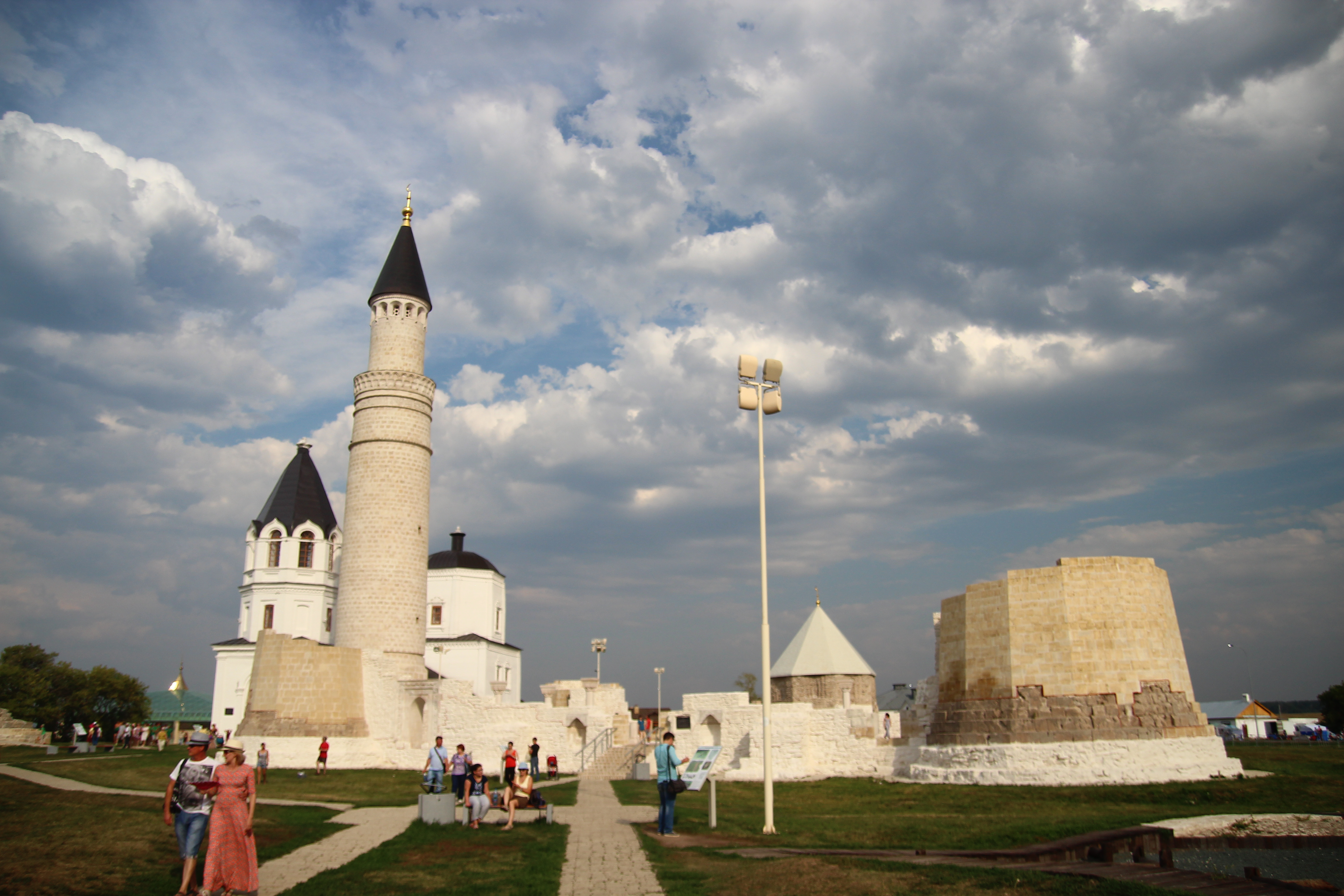 Комплекс памятников архитектуры XIII-XIV вв. на территории Булгарского городища (архитектурный комплекс «Болгары») (Республика Татарстан, Болгар, село Болгары, городище)